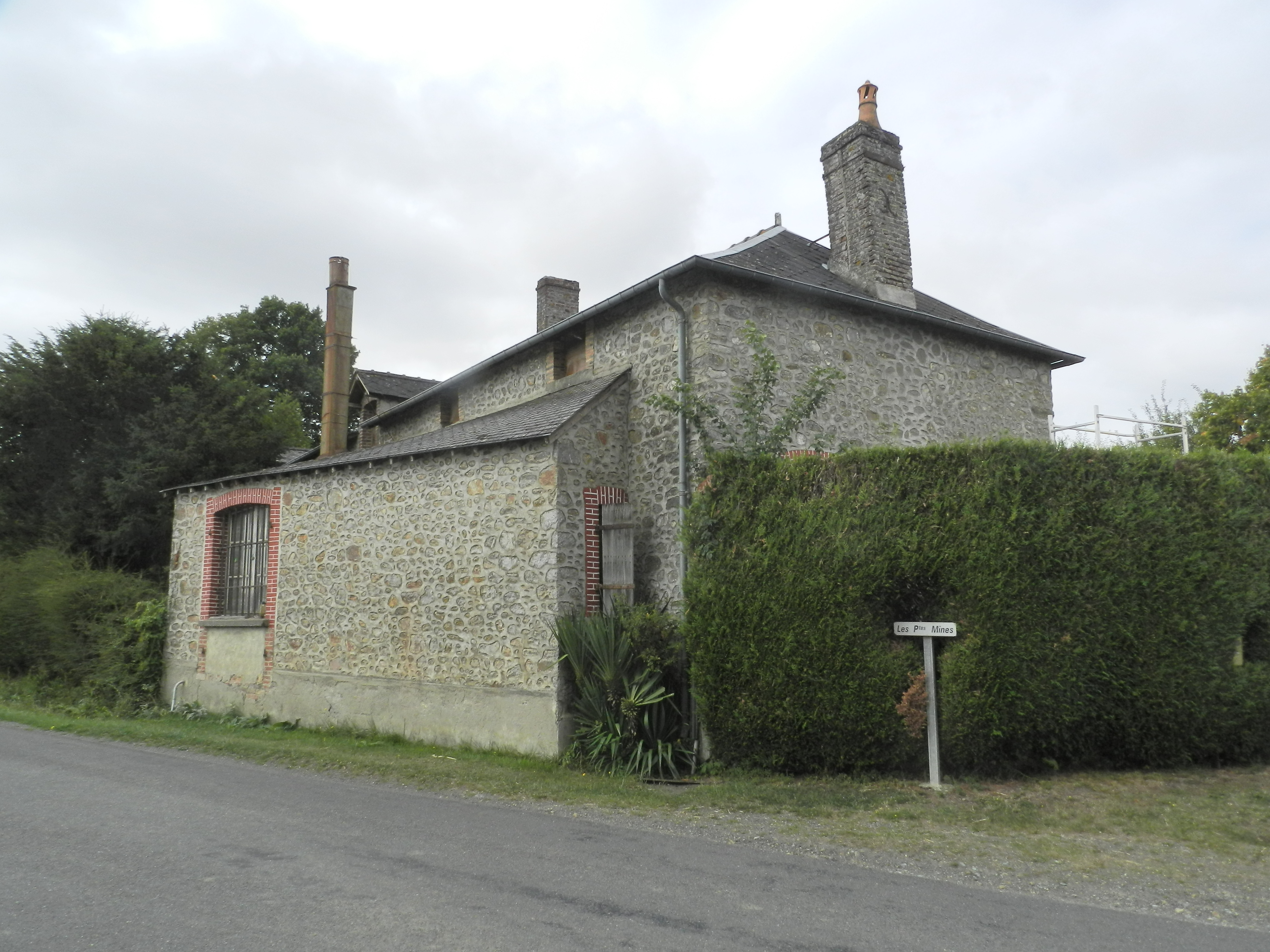 Les petites mines cotoyant l'ancien puits Mathieu